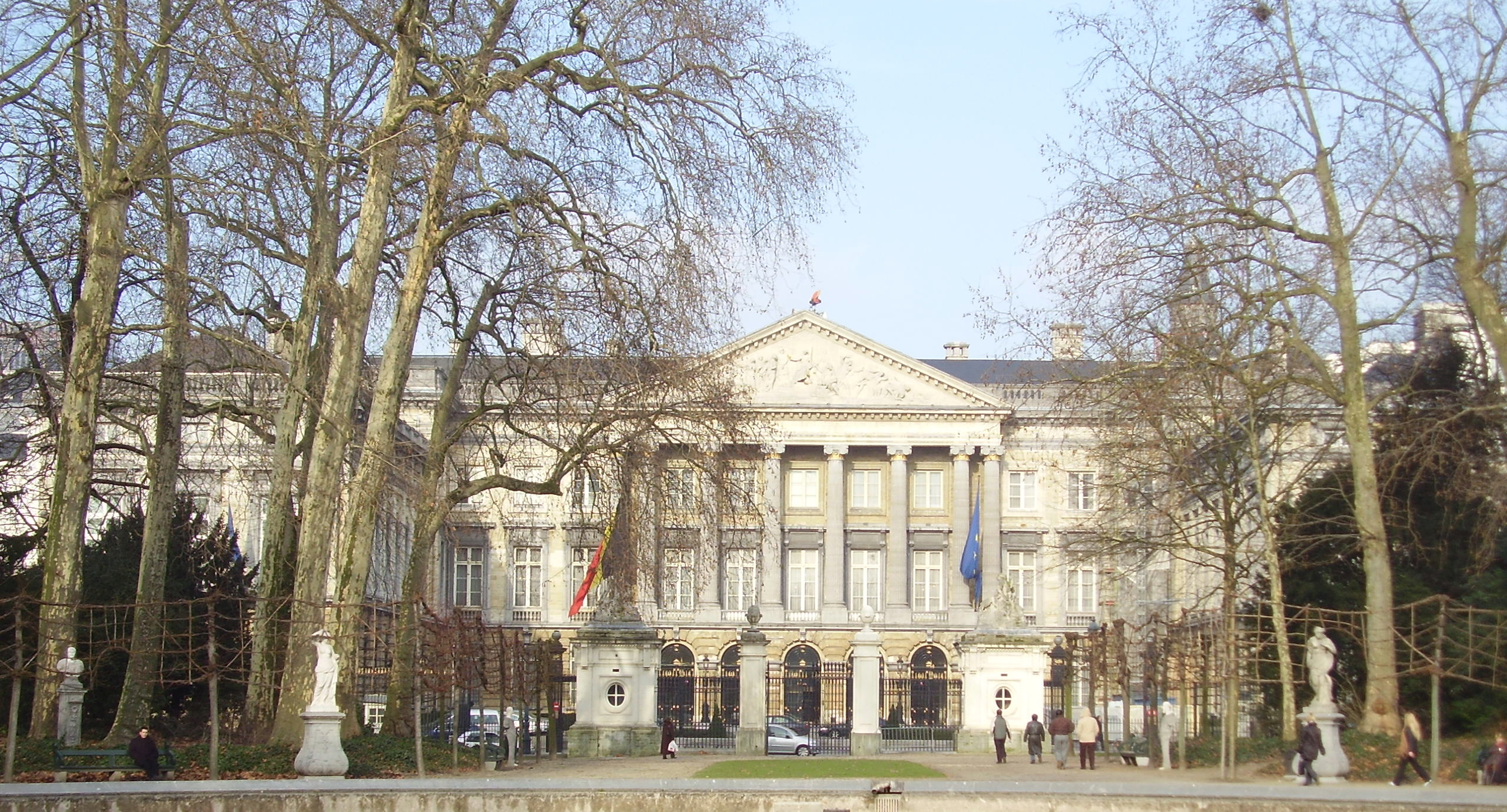 Parlement fédéral belge, Bruxelles - Belgique